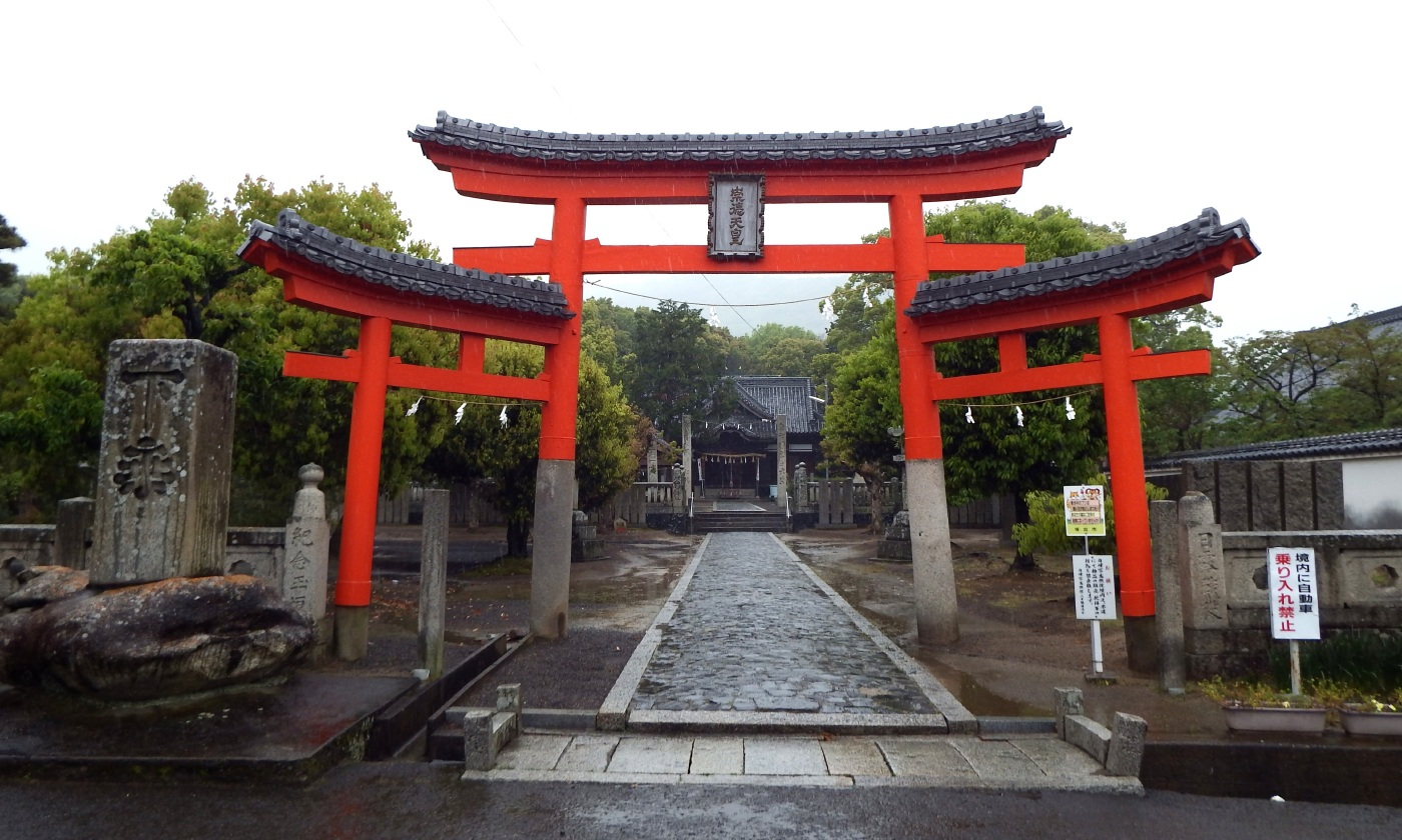 天皇寺の入口の三輪鳥居